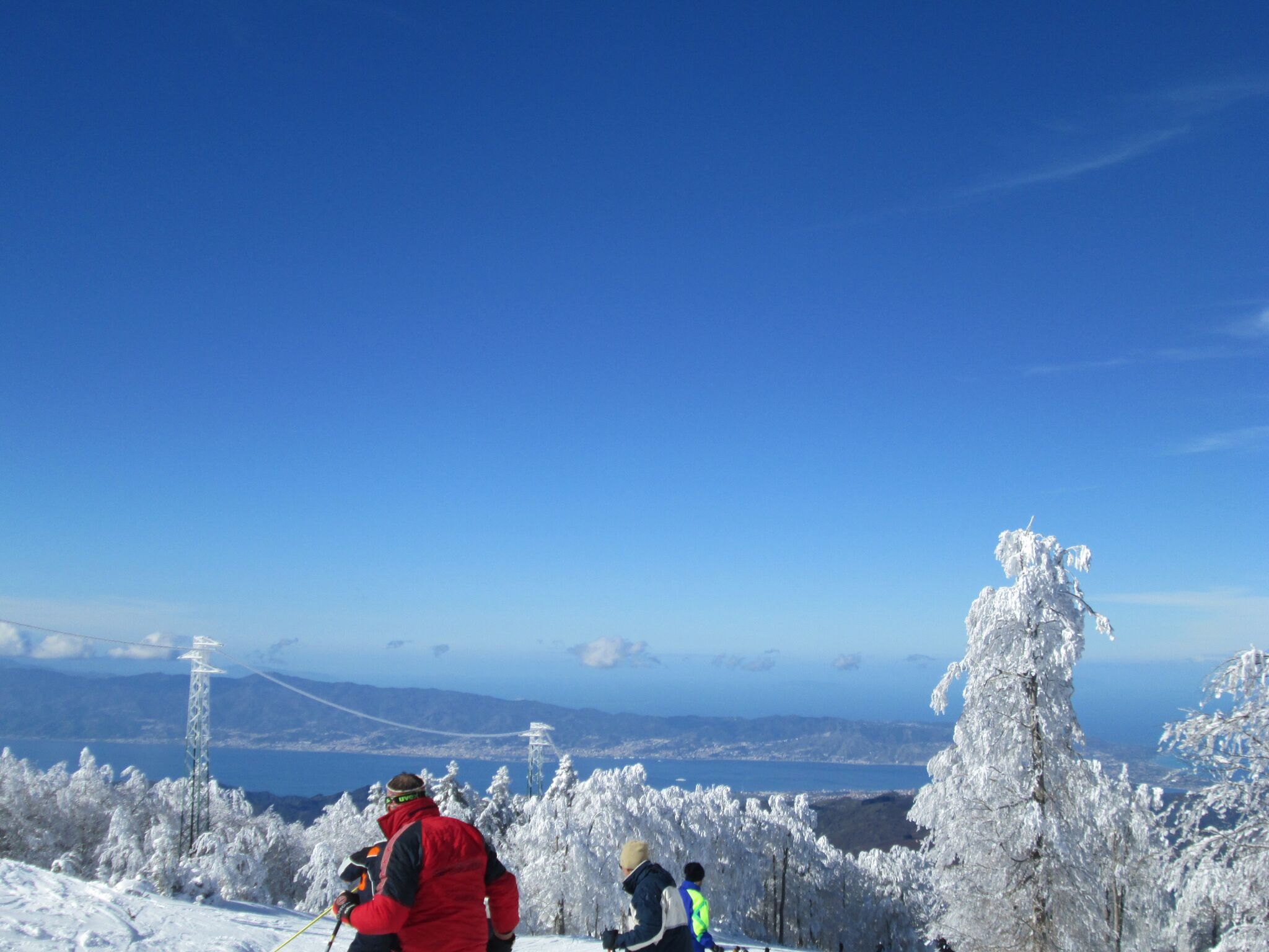 Gambarie d'Aspromonte